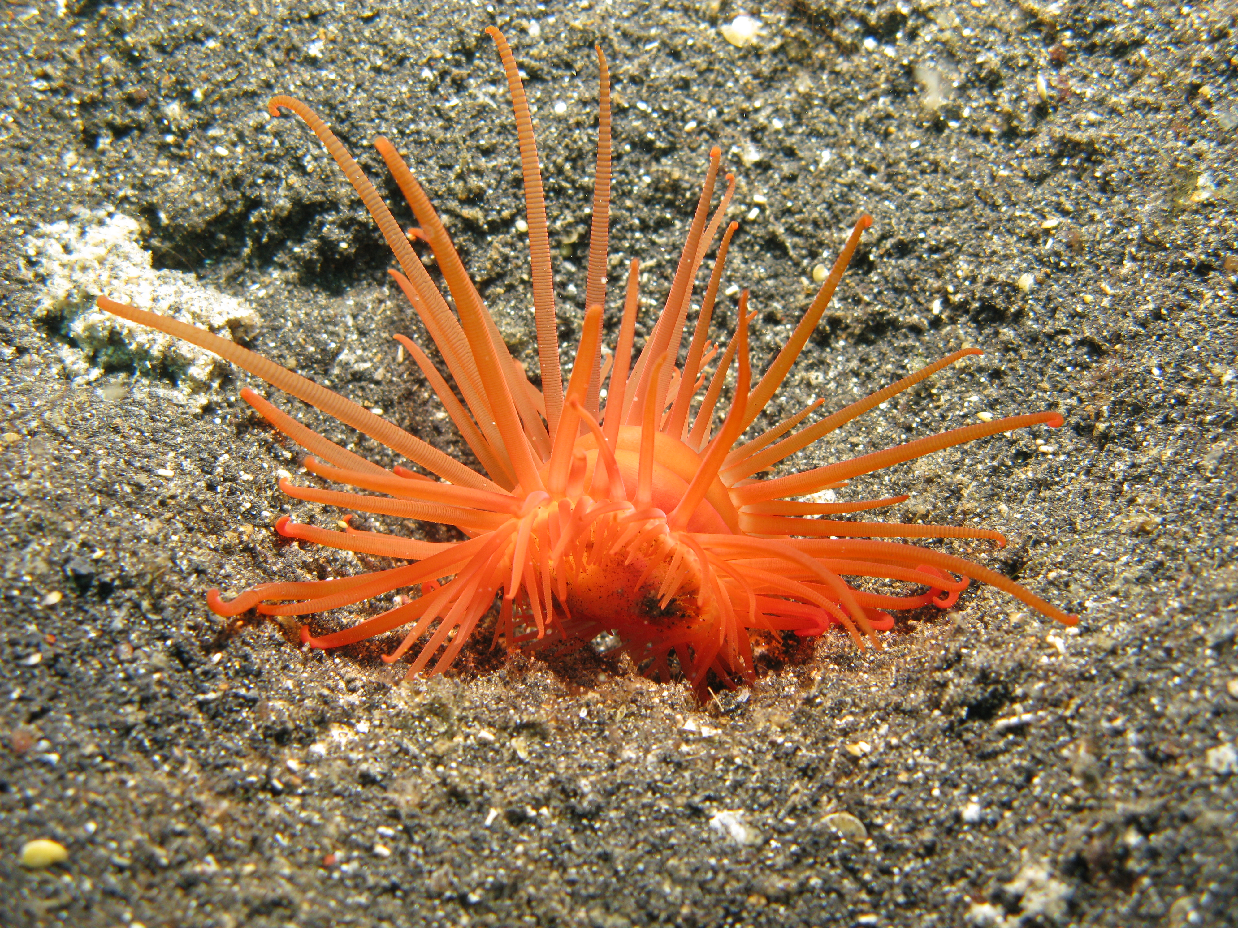 File Shell - Limaria Fragilis